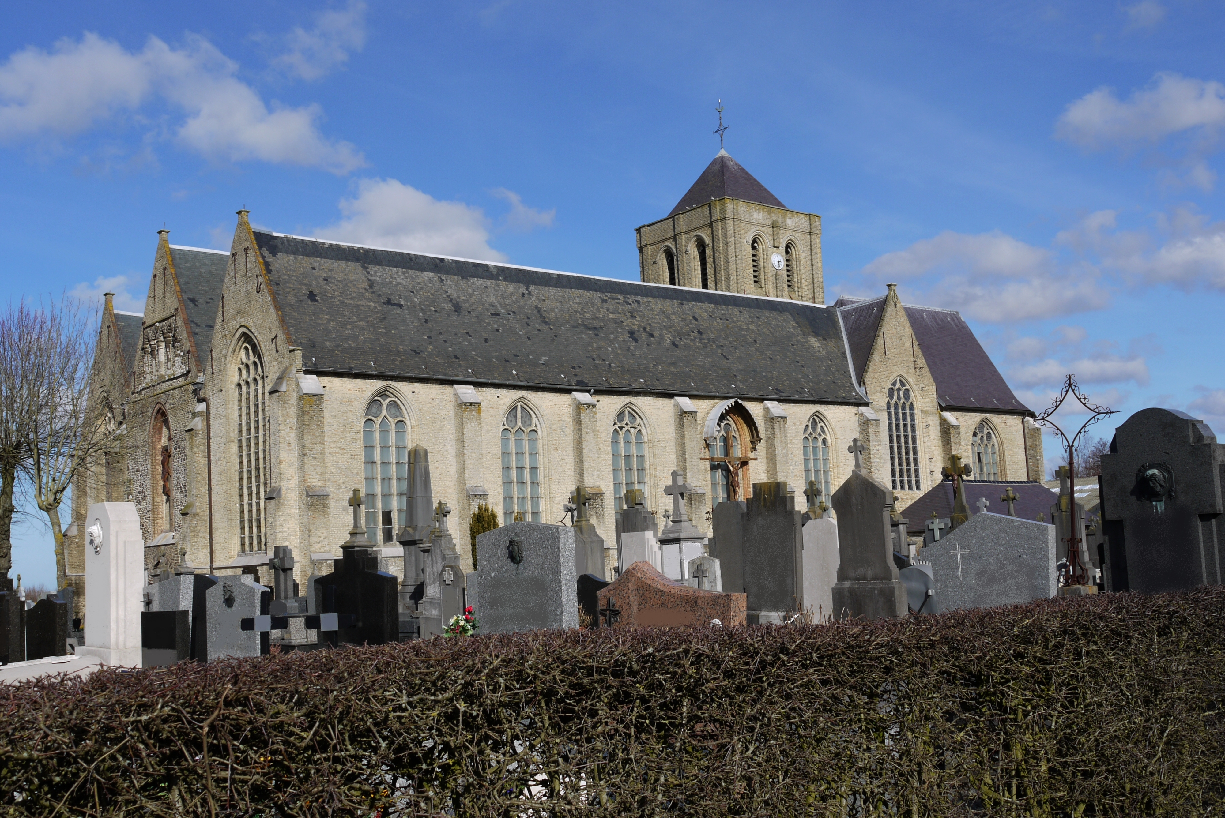 Église Saint-Omer de Quaëdypre (Nord, France) .